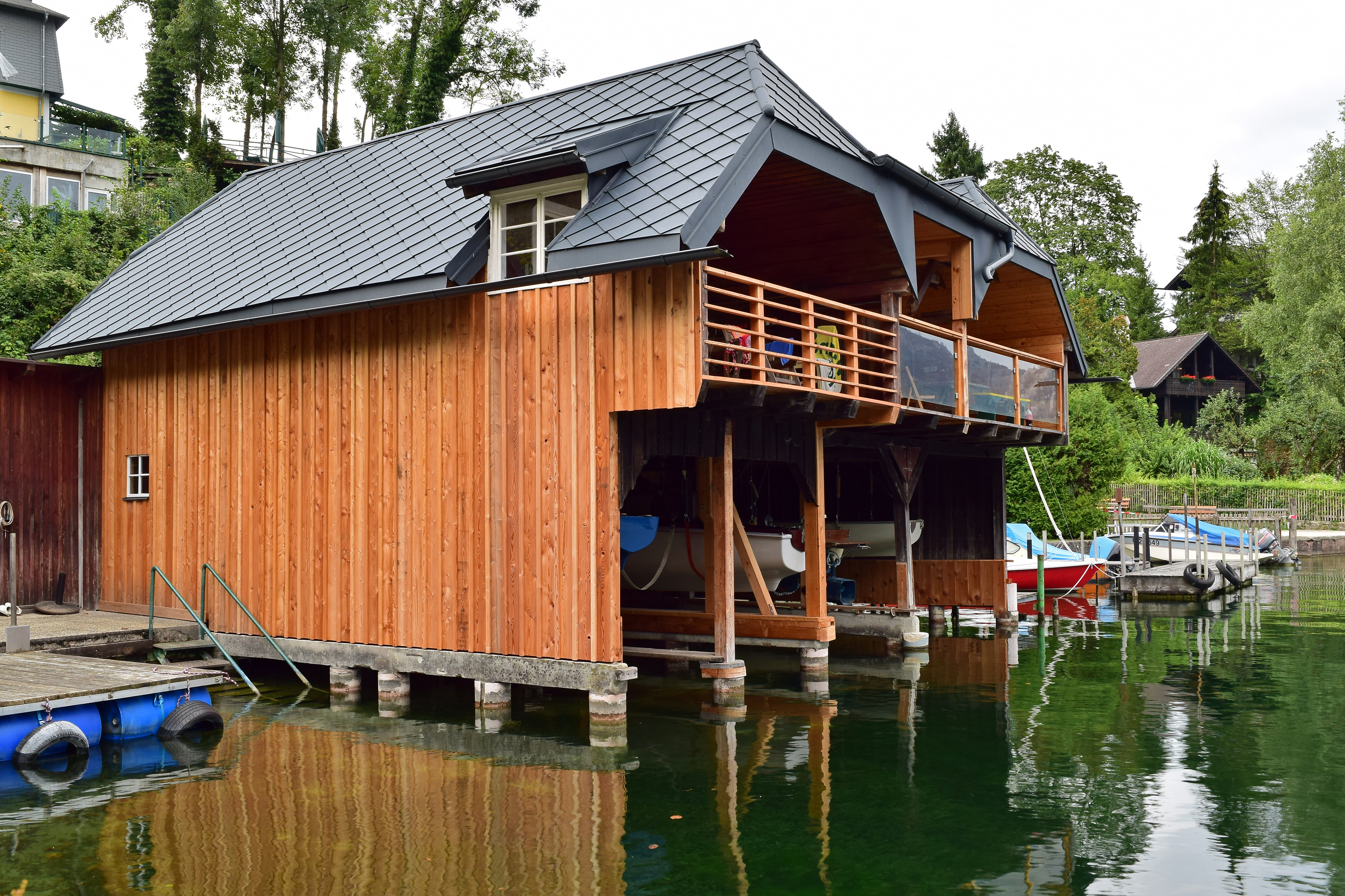 Denkmalgeschütztes Bootshaus in Traunkirchen